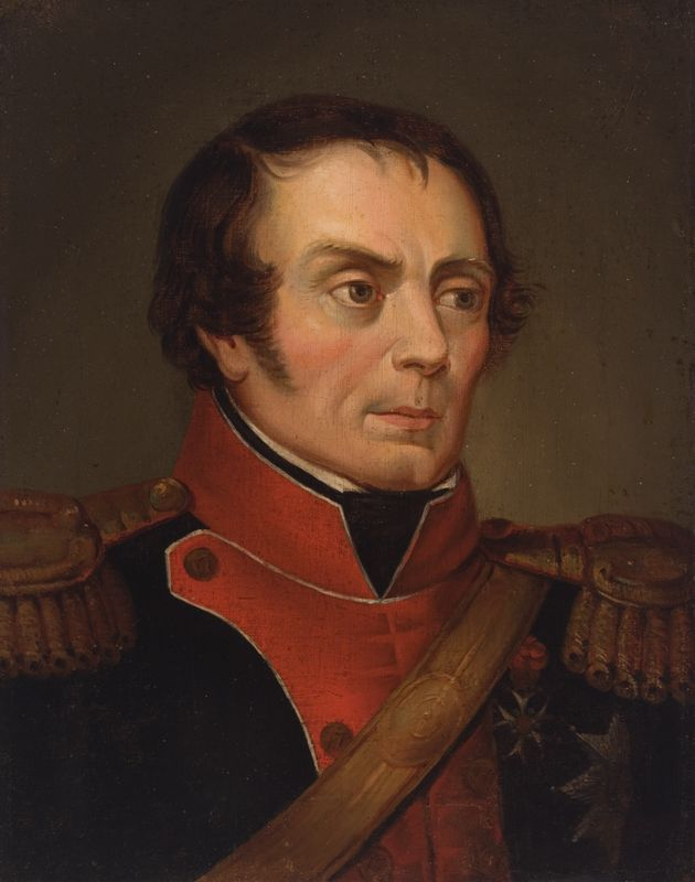 Беларуская (тарашкевіца): Партрэт Міхала Тышкевіча (Michał Tyškievič)